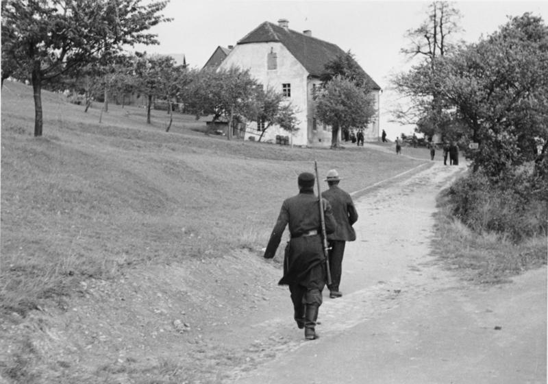 Heeres-Filmstelle Einmarsch in das Sudetenland. Abführung eines Verdächtigen durch Freikorpsmann. Sedlo-Pass. Sudetenland. 4.10.1938 Information added by Wikimedia users.Anm.: Es handelt sich wohl um eine Festnahme (Zur Verhaftung ist richterlicher Haftbefehl nötig. Festsetzen auf Verdacht wird als (vorläufige) Festnahme bezeichnet.)